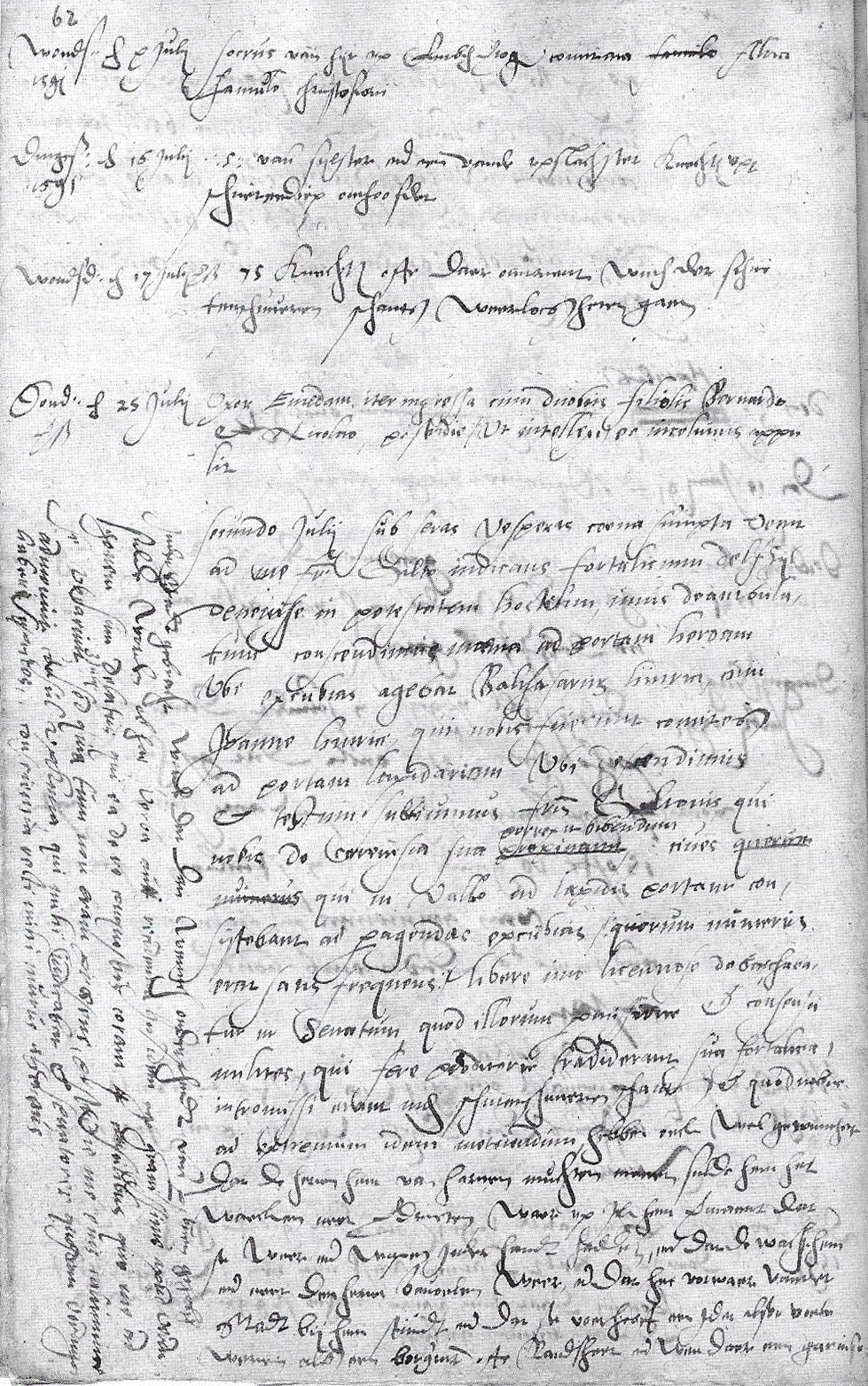 Bladzijde uit het geheime dagboek (16 december 1589 - 8 augustus 1594) van Johan Julsing (†1604), secretaris van de stad Groningen